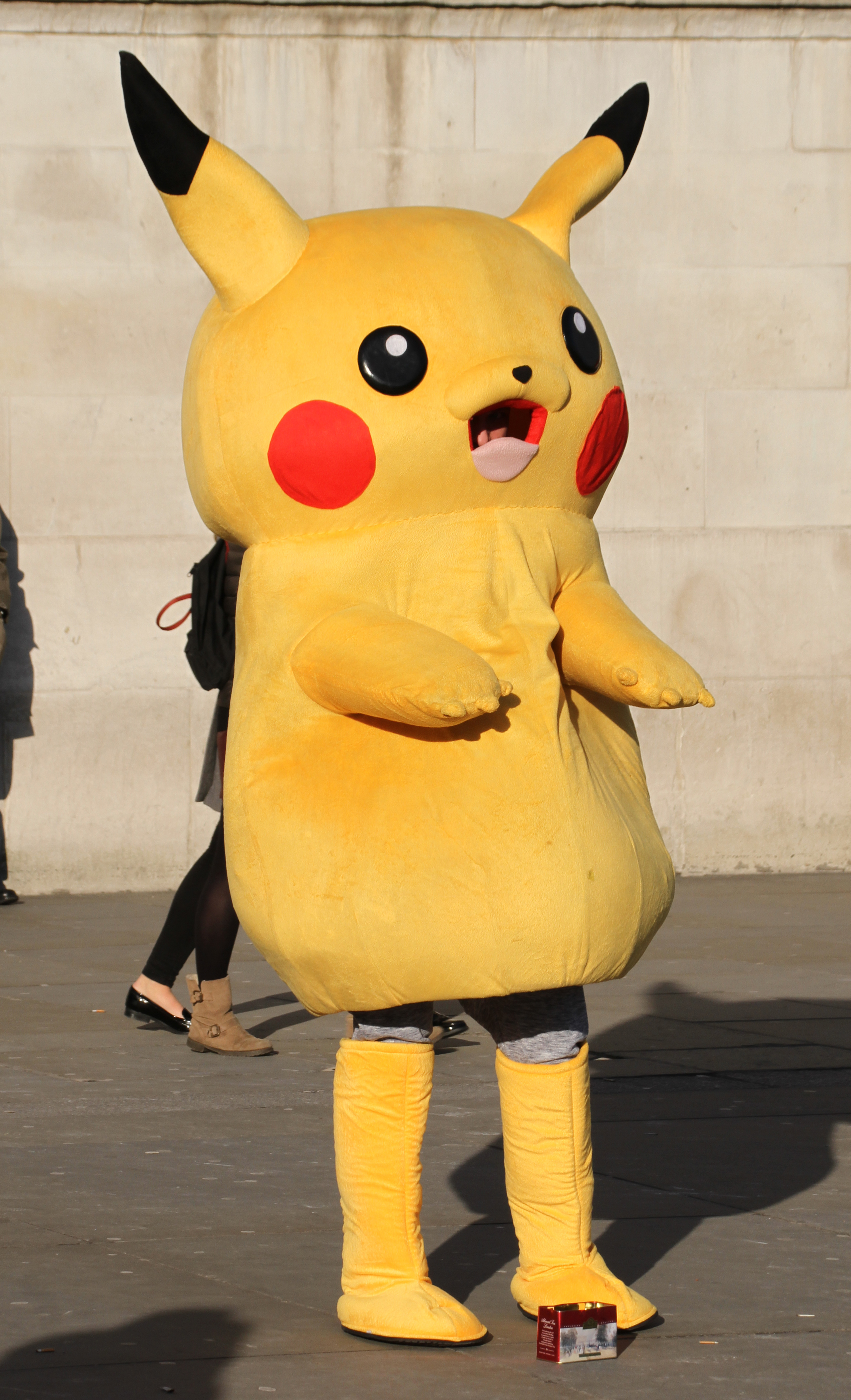 Pokemon